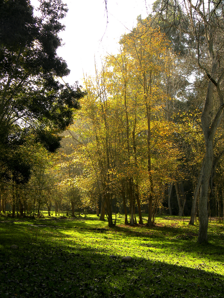 Ubicado en La Serena